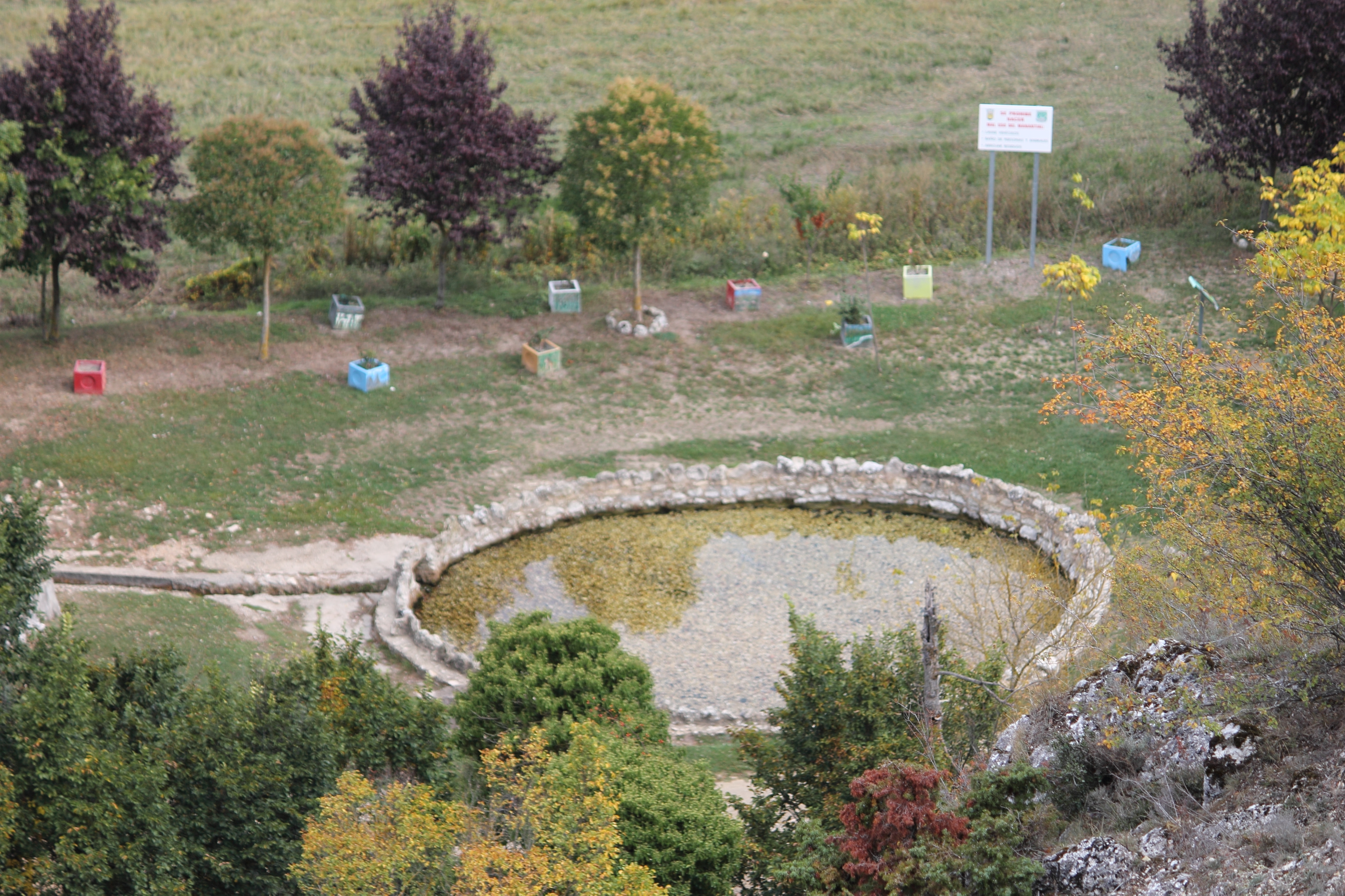 Pozo Blanco situado en los pies de la ladera sobre el Santuario de Santa Casilda en la zona de La Bureba (Burgos)